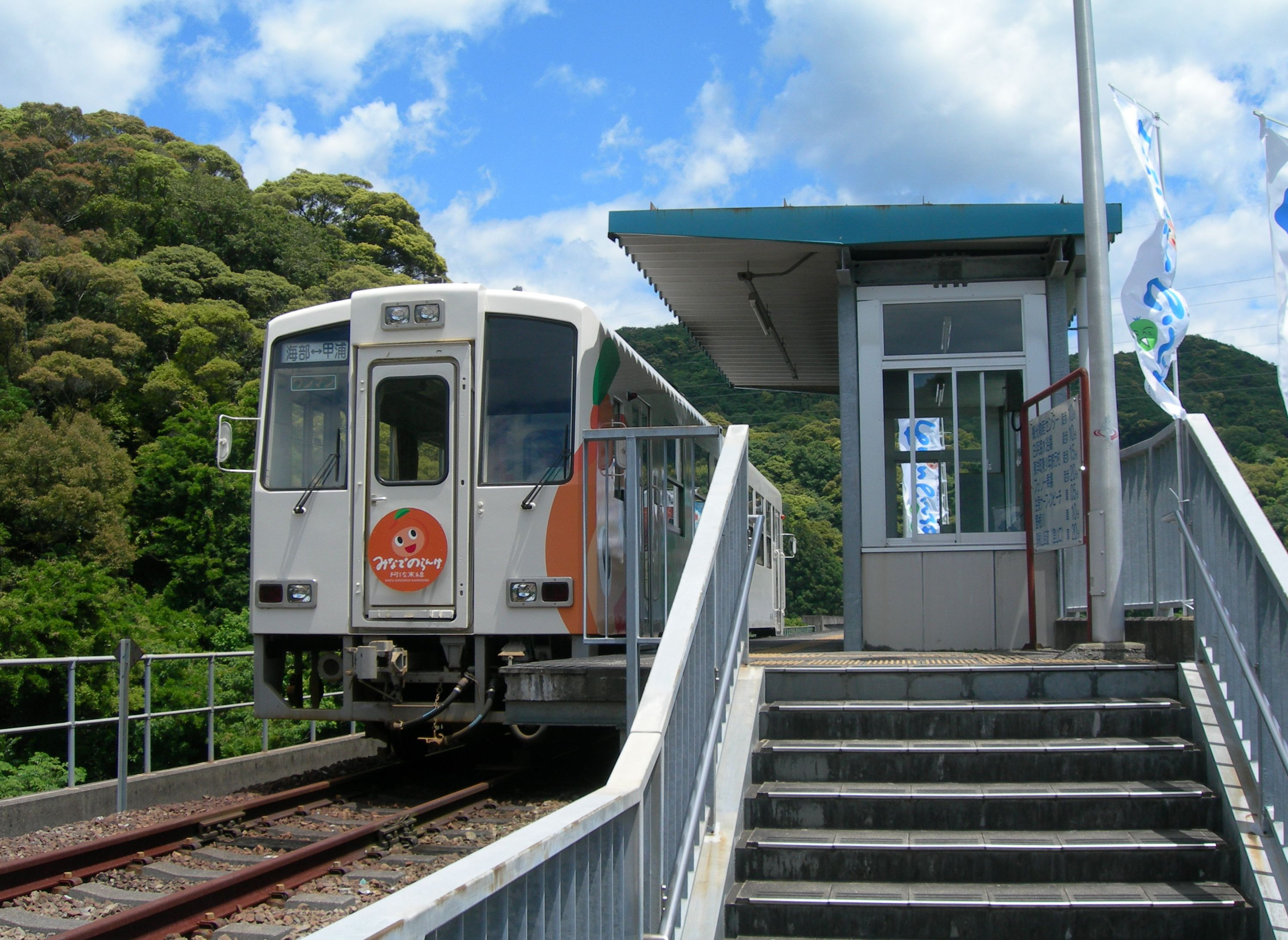 阿佐海岸鉄道・ASA-300形「たかちほ」(301)